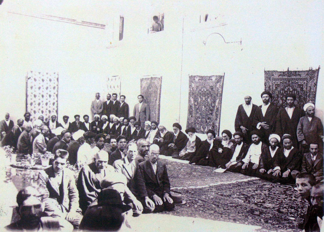 حضرت آيت الله ميرزا مهدى حسينى شيرازى در كنار حضرت آیت الله حاج آقا حسین قمی و حضرت آیت الله سید صدرالدین صدر